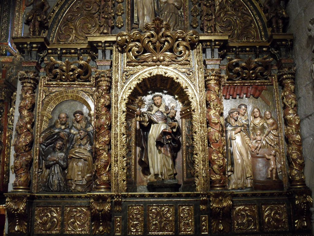 Santo dominico polaco del siglo XIII. Debe datarse este retablo hacia 1705.